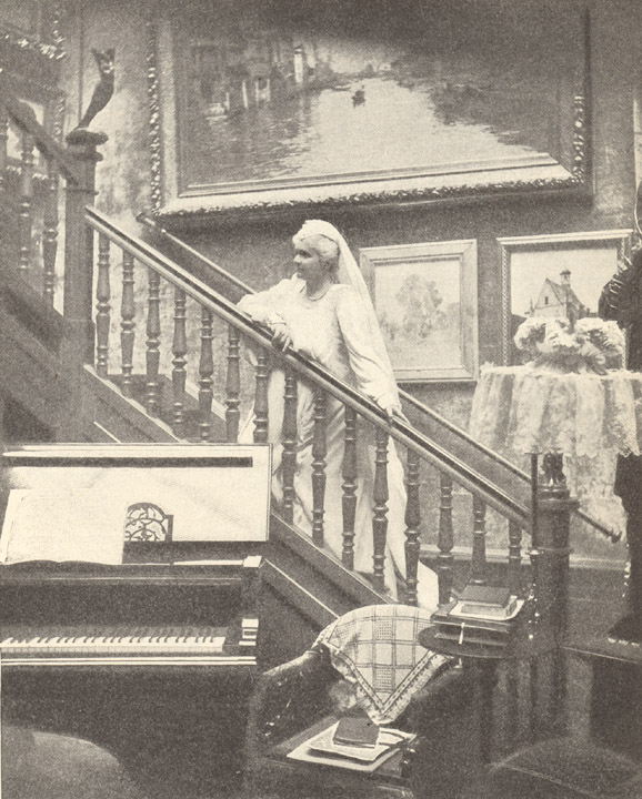 Königin Elisabeth von Rumänien - "Carmen Sylva" (1843-1916 geb. Prinzessin zu Wied)